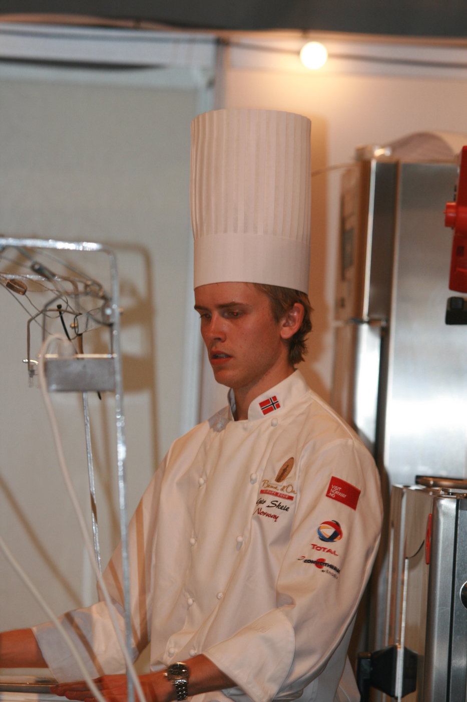 Geir Skeie under Bocuse d’Or 2008 I Stavanger